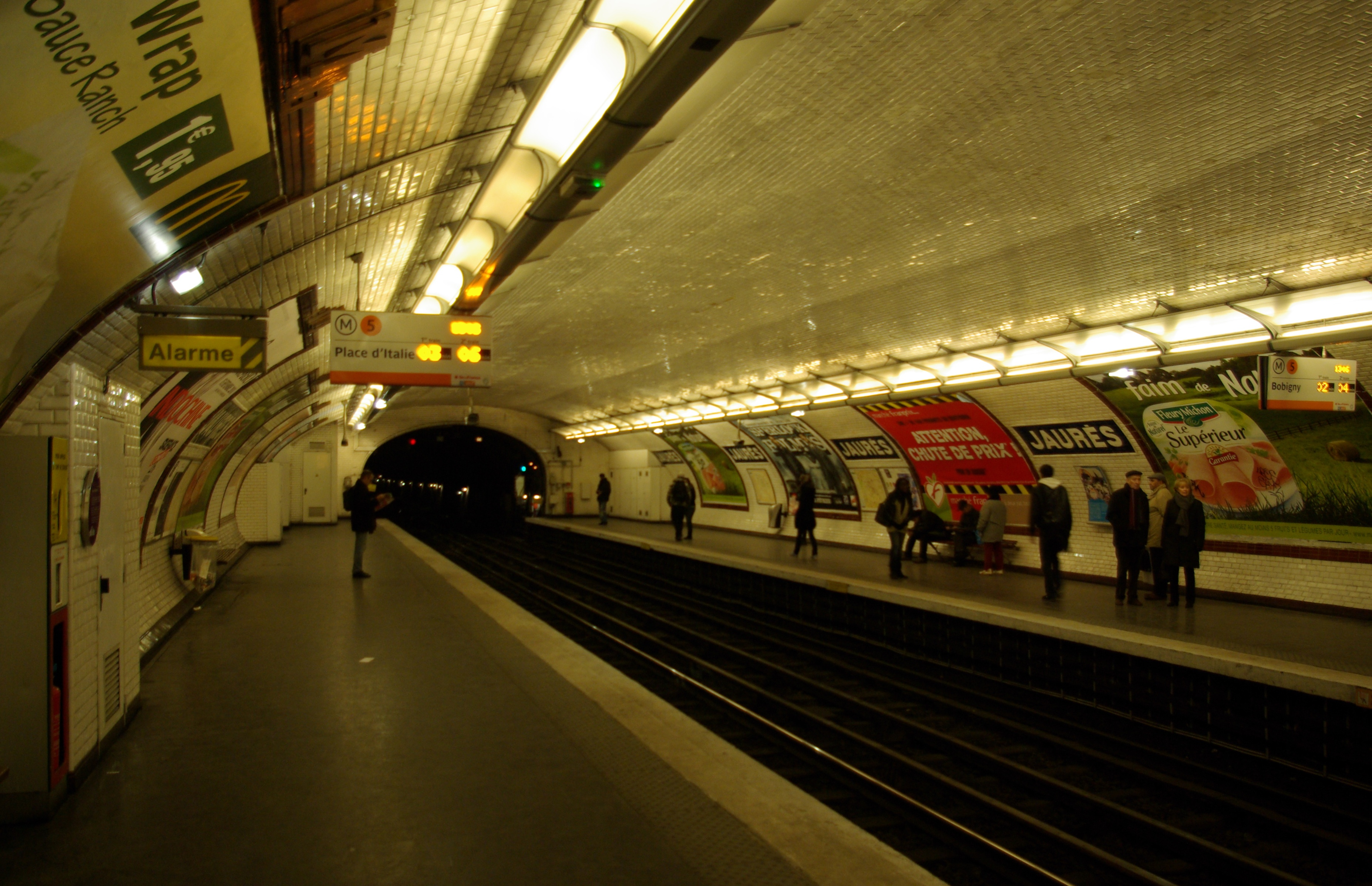 Station Jaurès der Métrolinie 5 in Paris